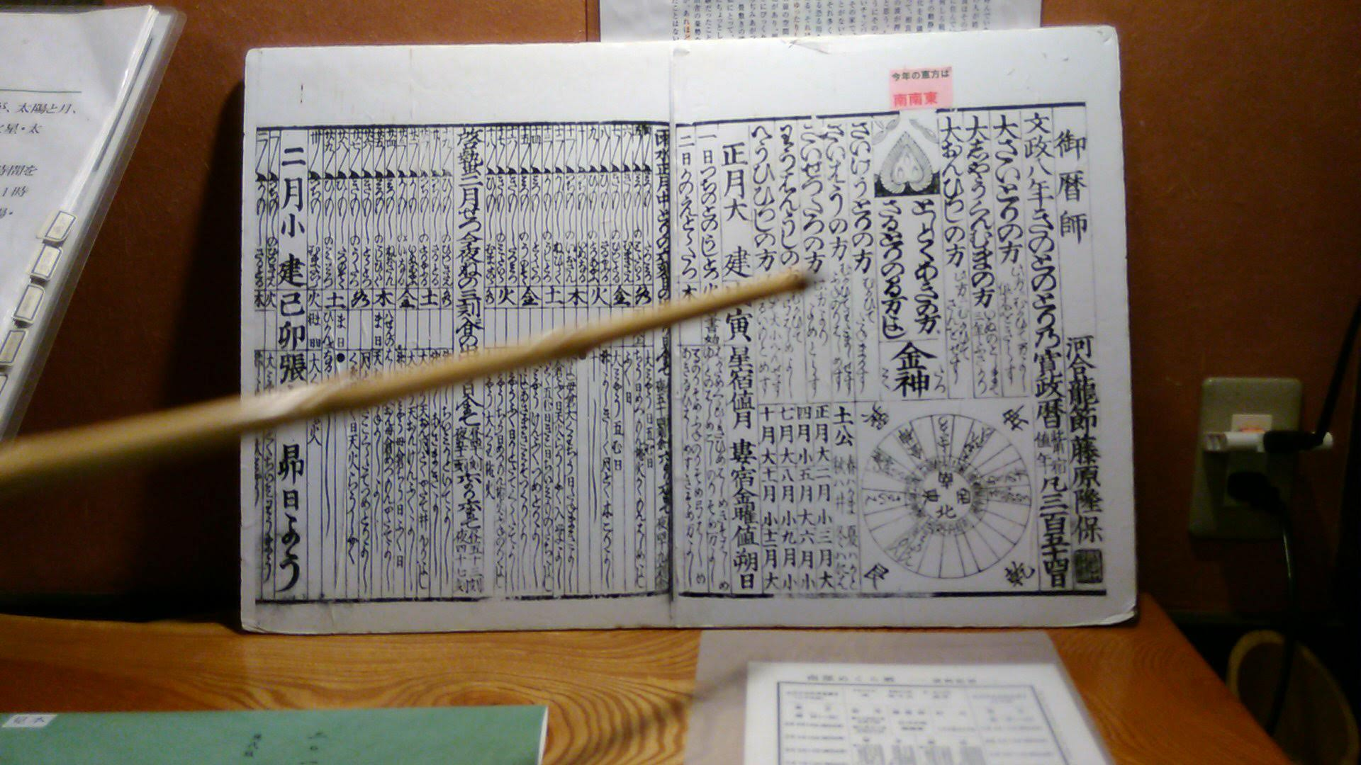 三島暦（みしまごよみ） 三嶋暦師の館展示物・静岡県三島市